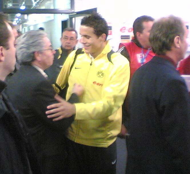 Philipp Degen